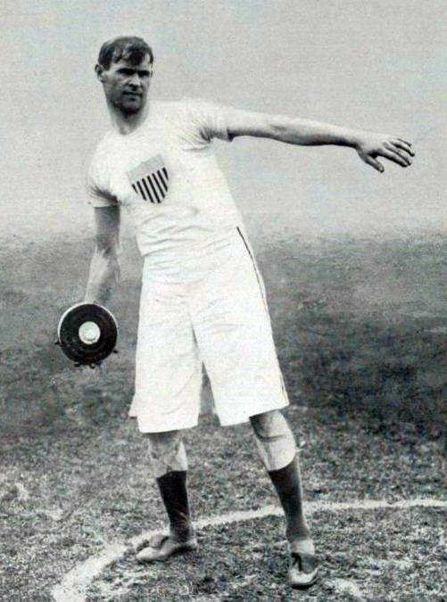 Martin Sheridan, vainqueur du lancement du disque aux JO de 1908.